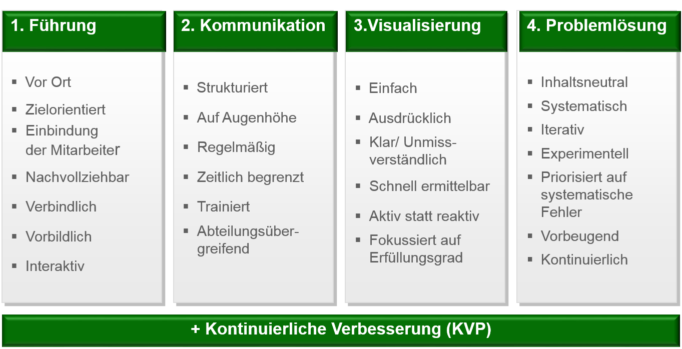 4+1 Säulen des Shop Floor Management